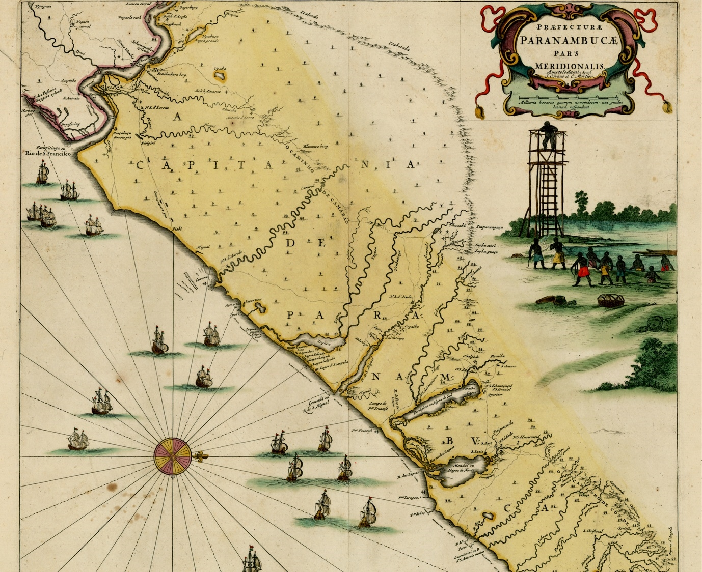 Parte sul da Capitania de Pernambuco, com representação do Quilombo dos Palmares.